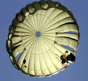 Hauptkappe des Truppenfallschirms MC-6 von unten betrachtet. Gut sichtbar sind die Öffnungen im vorderen Bereich der Kappe und die Steueröffnungen an den Seiten.